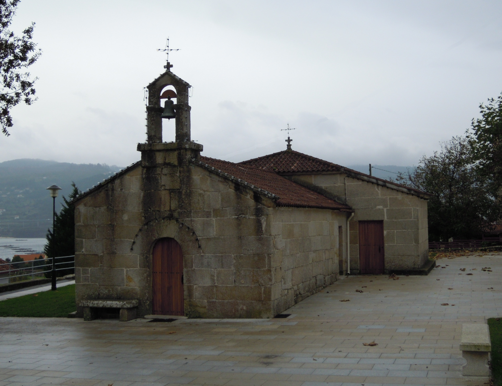 Ermida de san Bieito no Calvar (Domaio, Moaña).